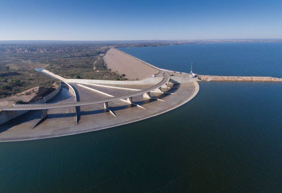 El embalse El Carrizal en su cota máxima durante el 2016.